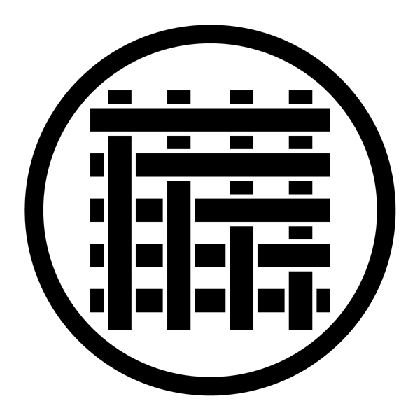 遠山九字直違